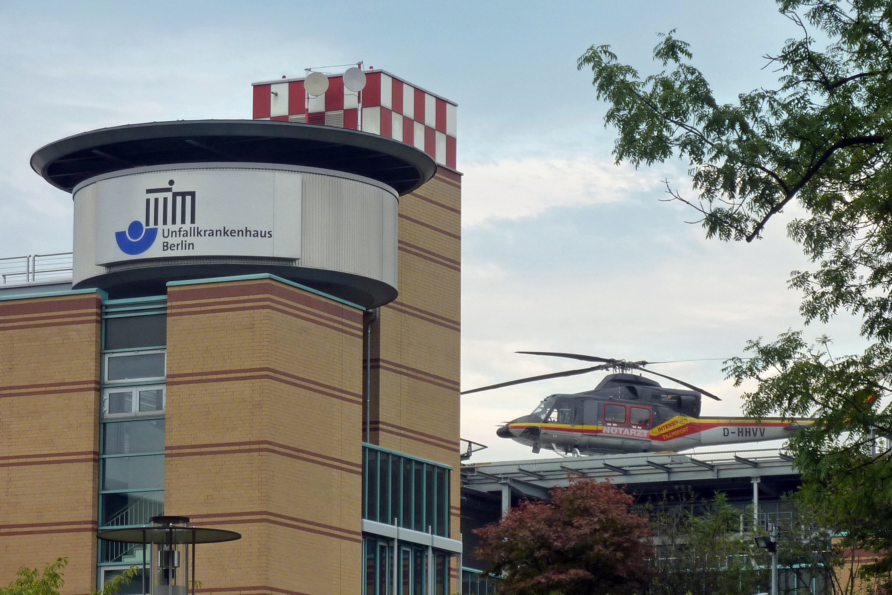 Unfallkrankenhaus Berlin in Berlin-Biesdorf, Blick auf das Dach mit geparktem Rettungshubschrauber.